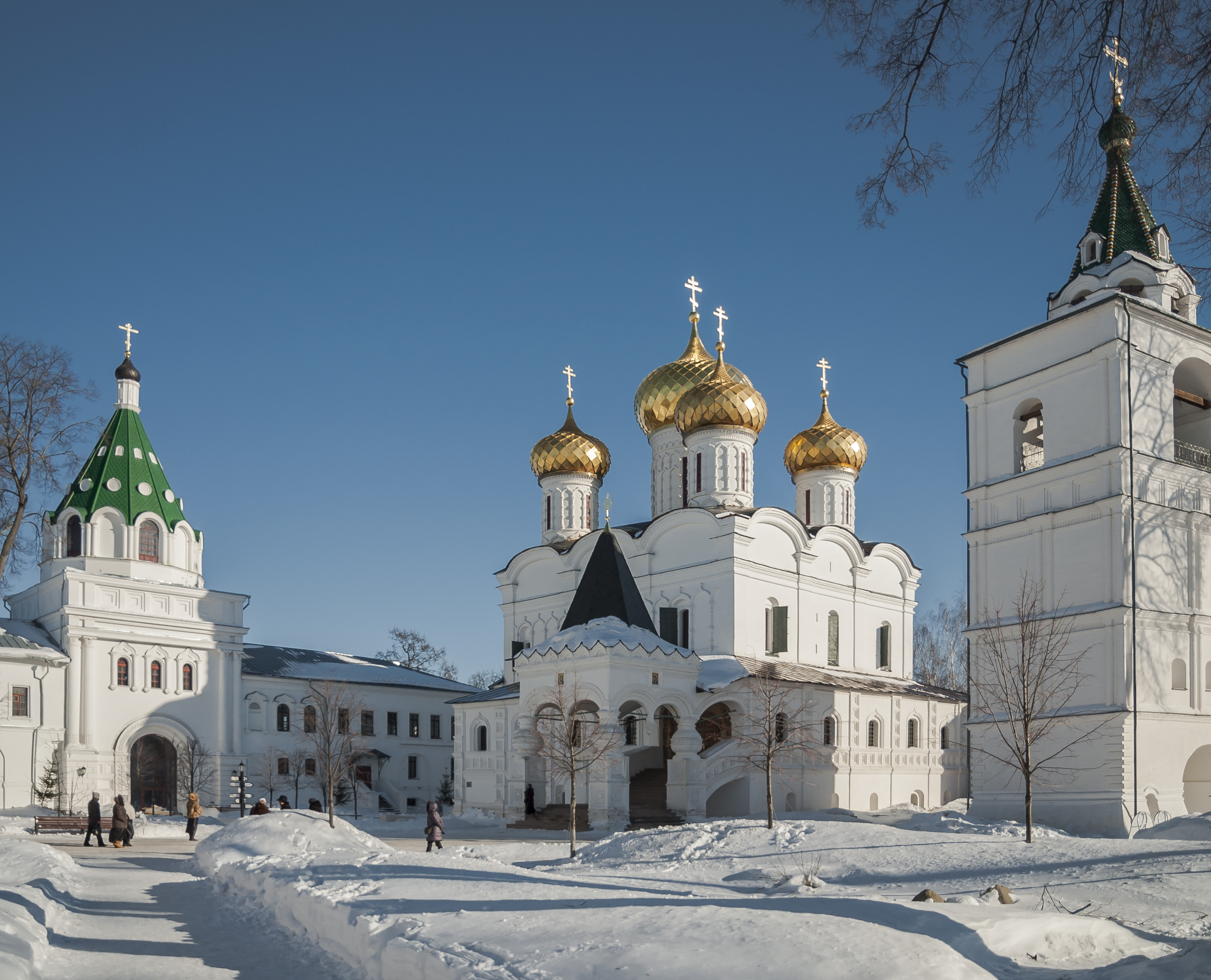 Ансамбль Ипатьевского монастыря: улица Просвещения, 1, Кострома, Костромская область